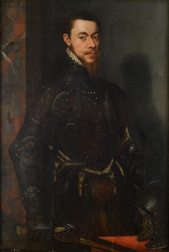 Günther der Streitbare als junger Oberst, aus dem Schlossmuseum Sondershausen